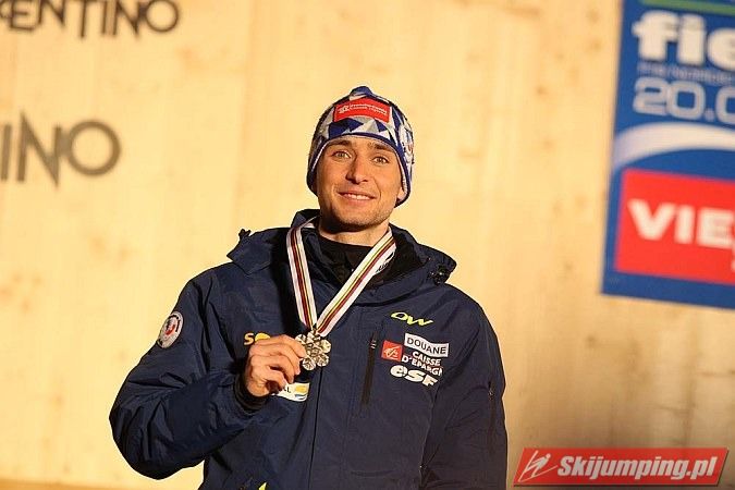 Dekoracja medalowa zawodów indywidualnych HS 134/10 km